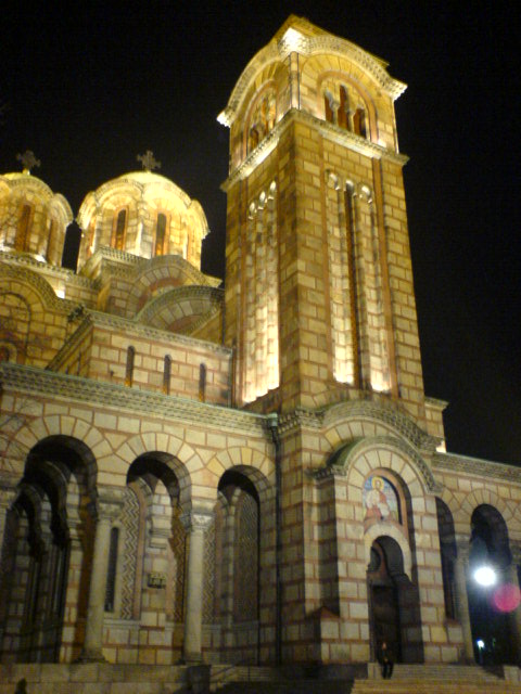 St. Marko Church in Belgrade.